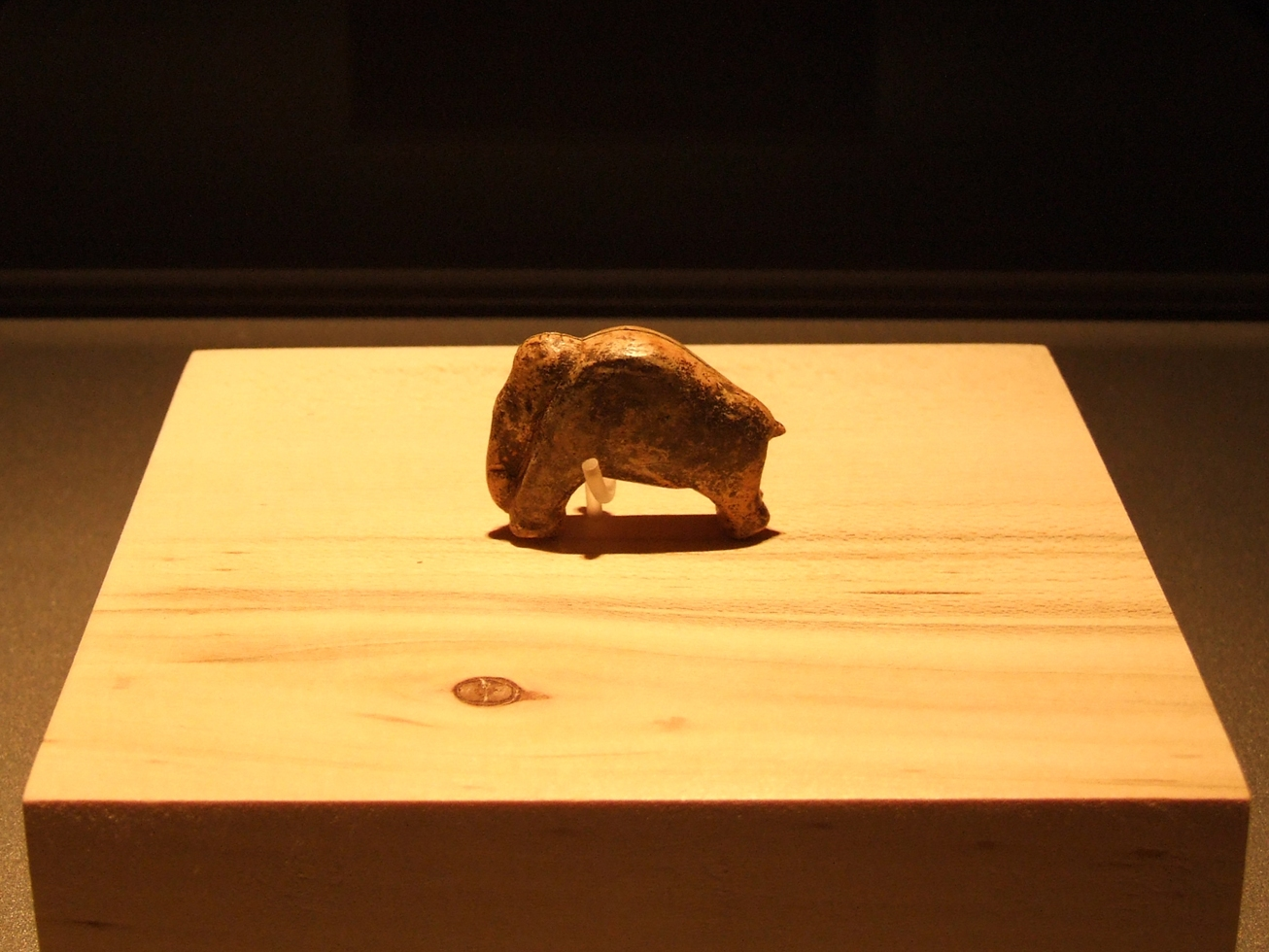 Das Mammut vom Vogelherd.